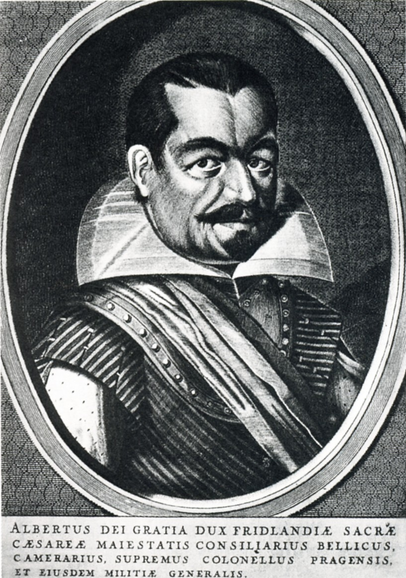 Wallenstein im Alter von etwa 40 Jahren, Kupferstich. Inschrift: ALBERTUS DEI GRATIA DUX FRIDLANDIAE SACRAE CAESAREAE MAIESTATIS CONSILIARIUS BELLICUS, CAMERARIUS, SUPREMUS COLONELLUS PRAGENSIS ET EIUSDEM MILITIAE GENERALIS